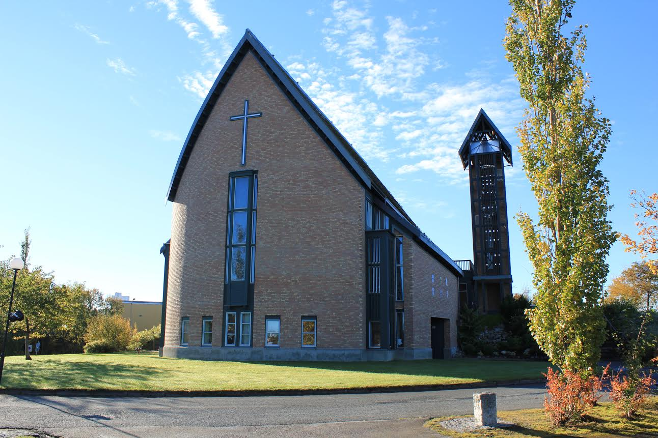 Hoeggen kirke, Trondheim. Sett fra øst